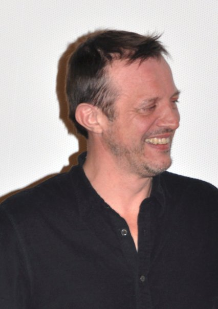 Alfred Lot à l'avant-première de Une petite zone de turbulences.